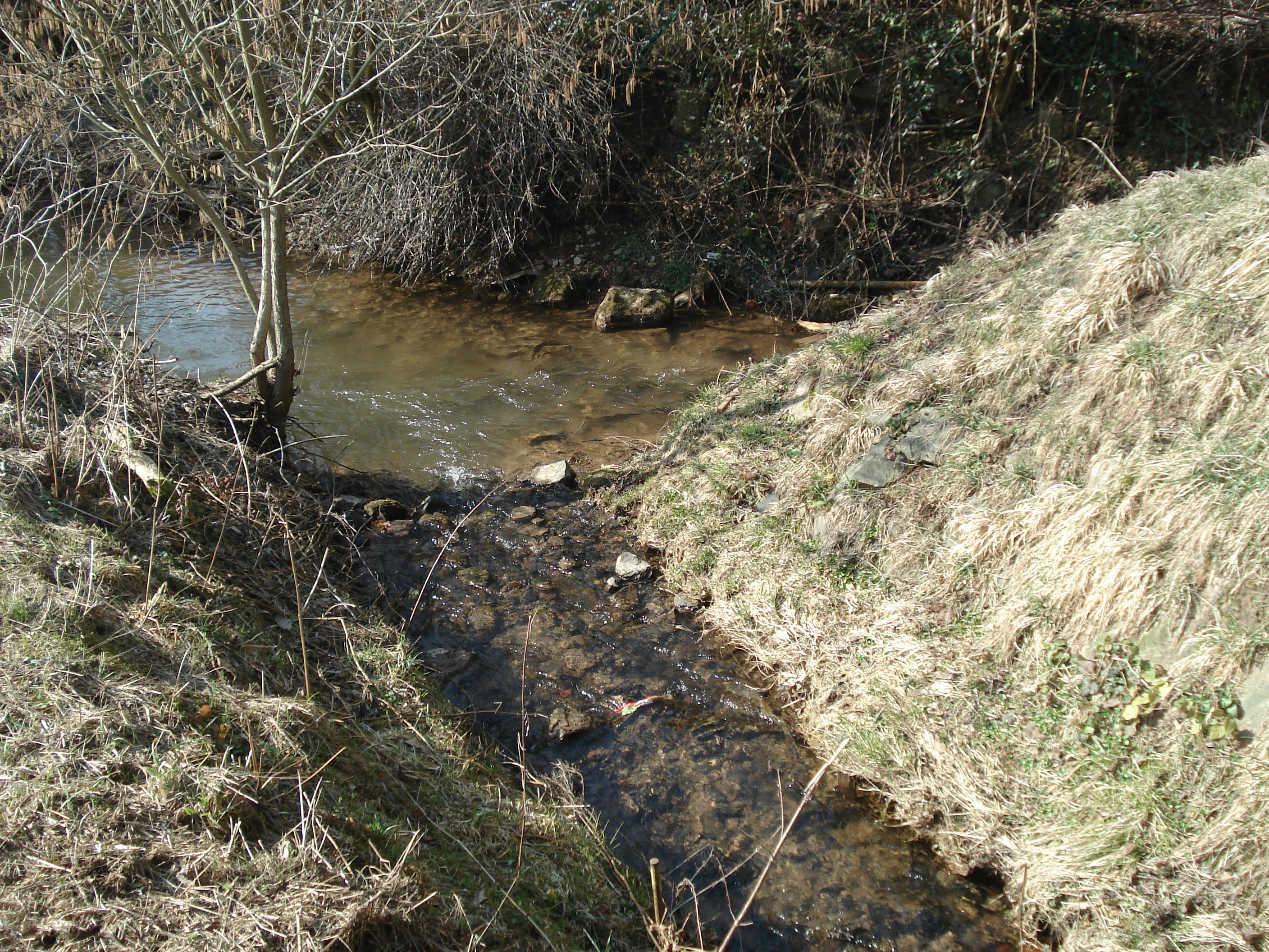 Der Herzbach mündet in den Westerbach